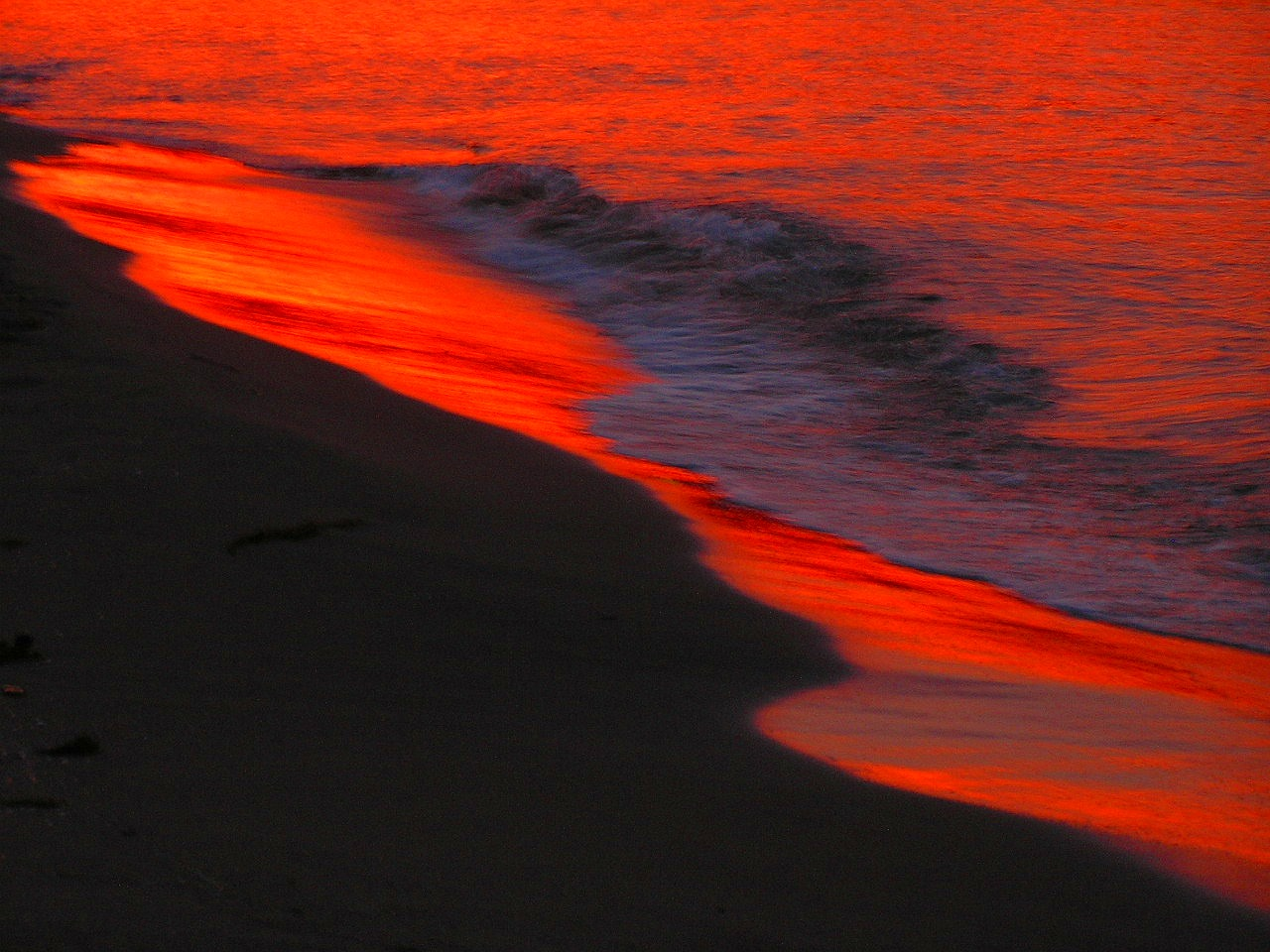 夕暮れの波打ち際